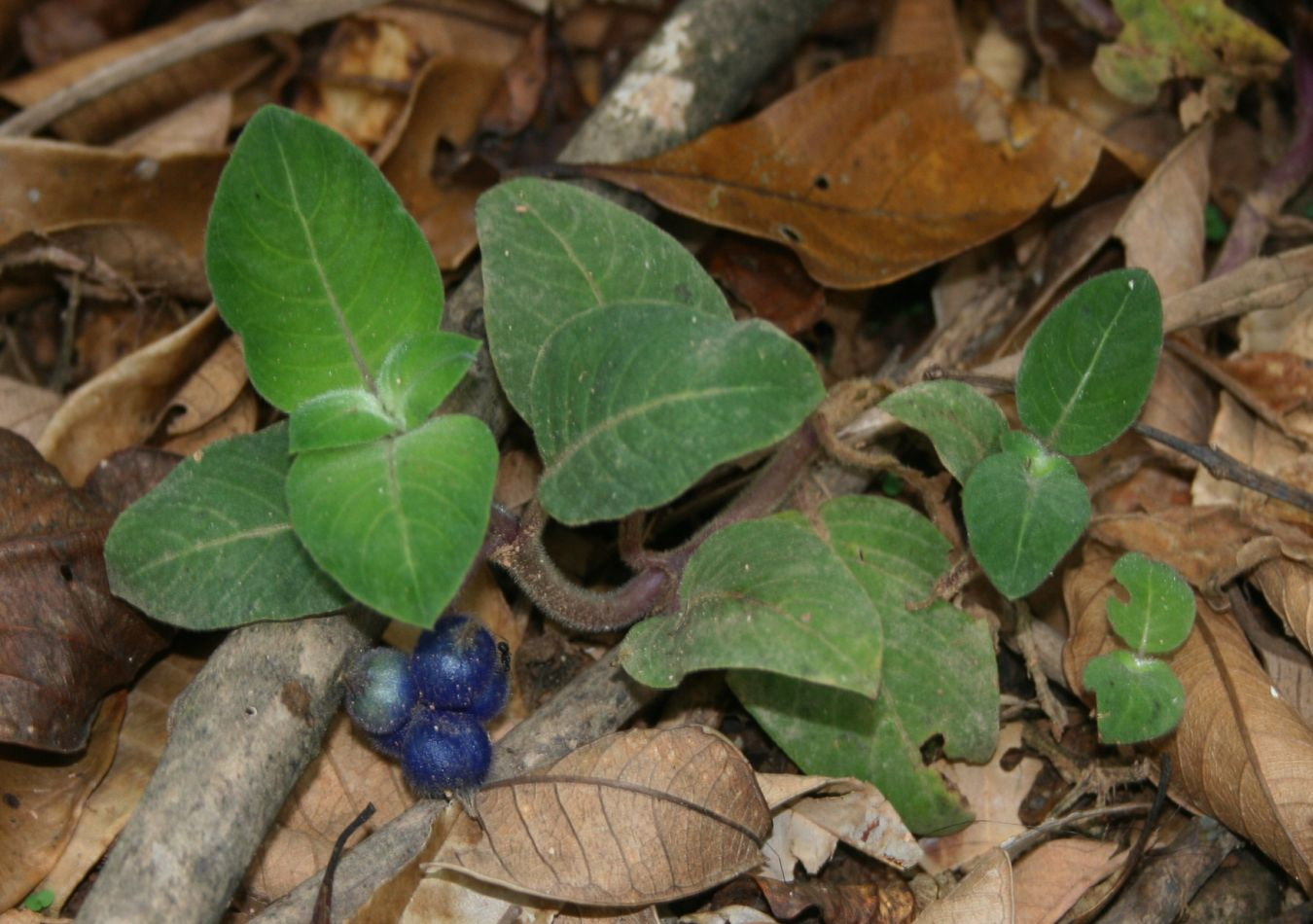 Coccocypselum hirsutum, Kaffeegewächse (Rubiaceae) - Costa Rica: Prov. Puntarenas, La Gamba NW Golfito, "Fila Trail" NW "Tropenstation La Gamba"/"Estación Biológica La Gamba"